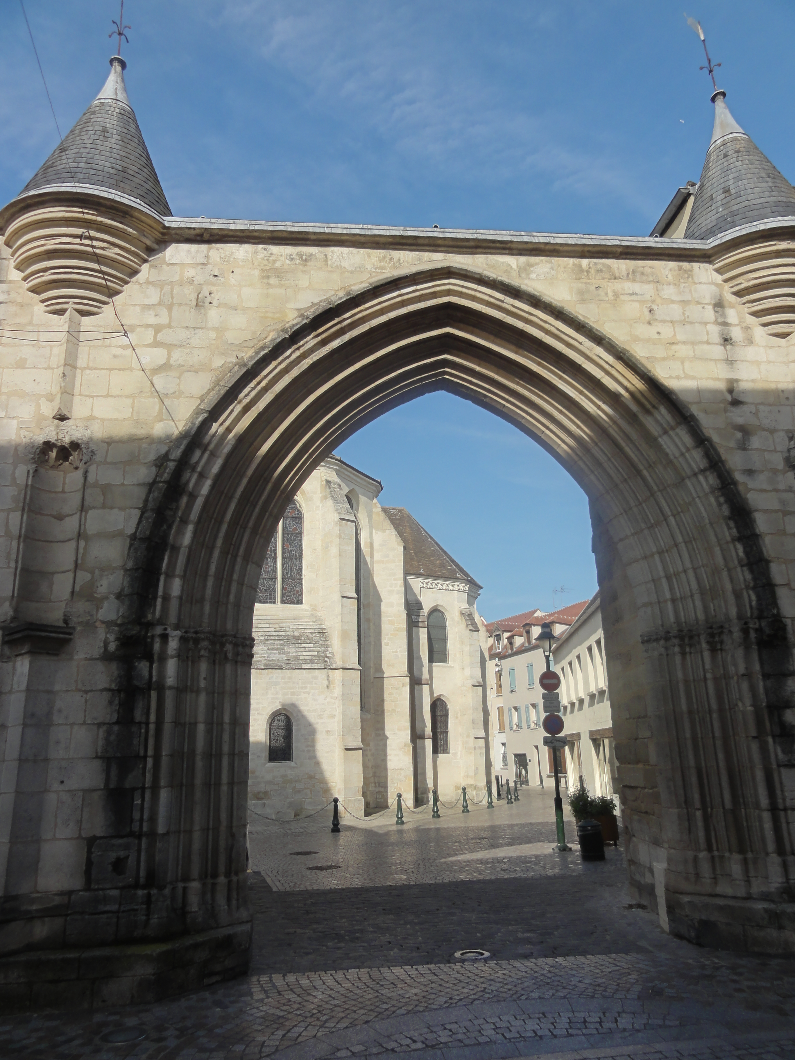 Portail de l'ancien enclos du chapitre, rue Saint-Spire / cloître Saint-Spire.